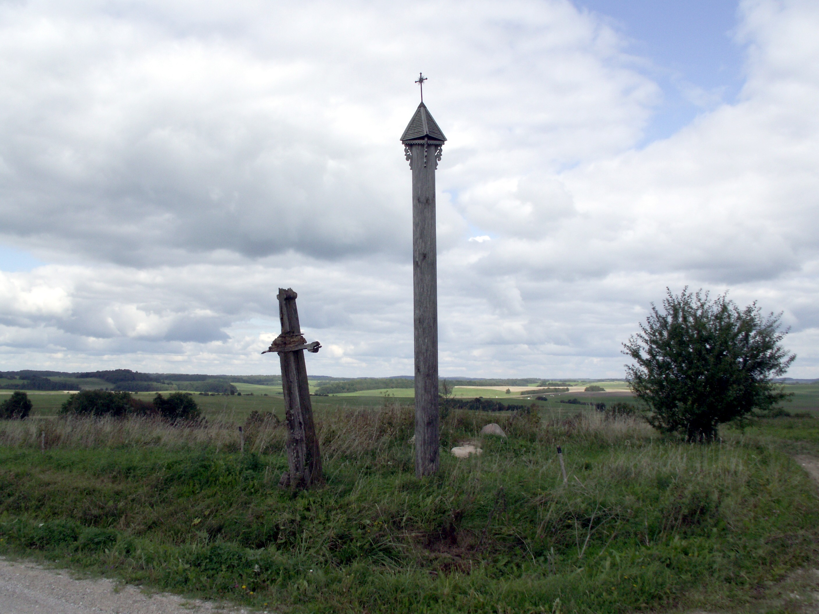 Pesiai, Šilalės rajonas, Lietuva